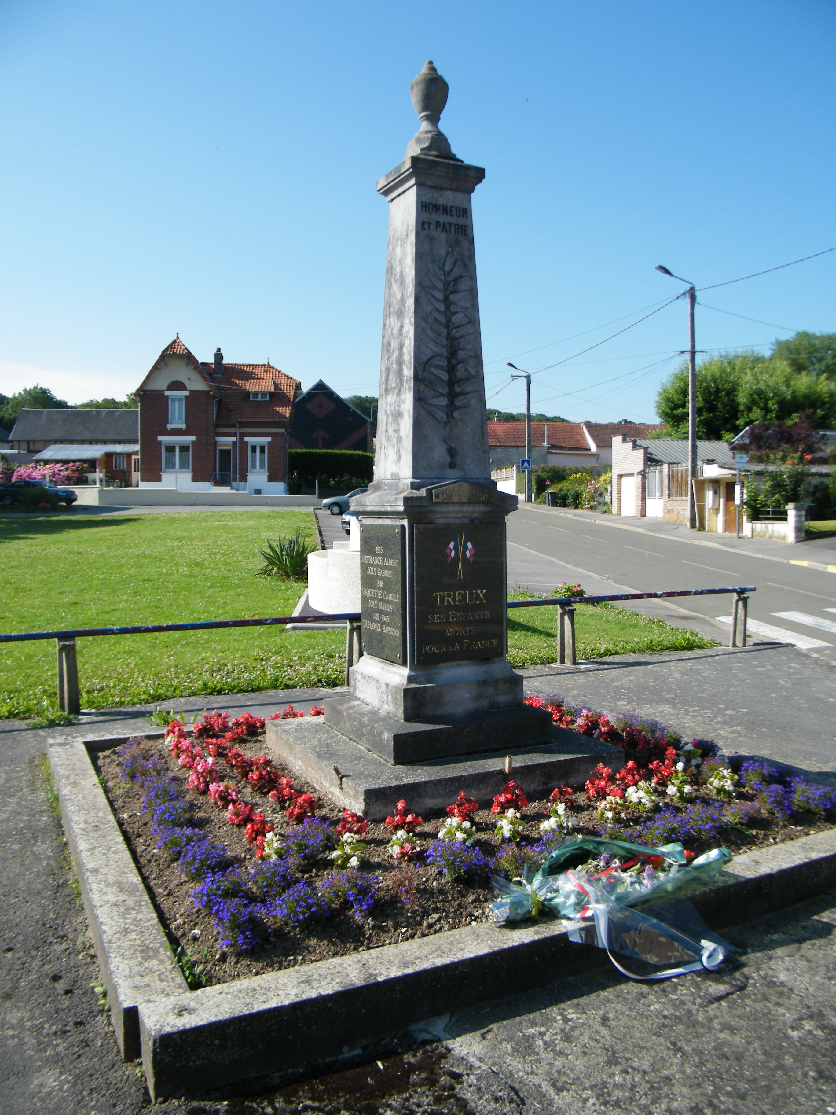 Monument.